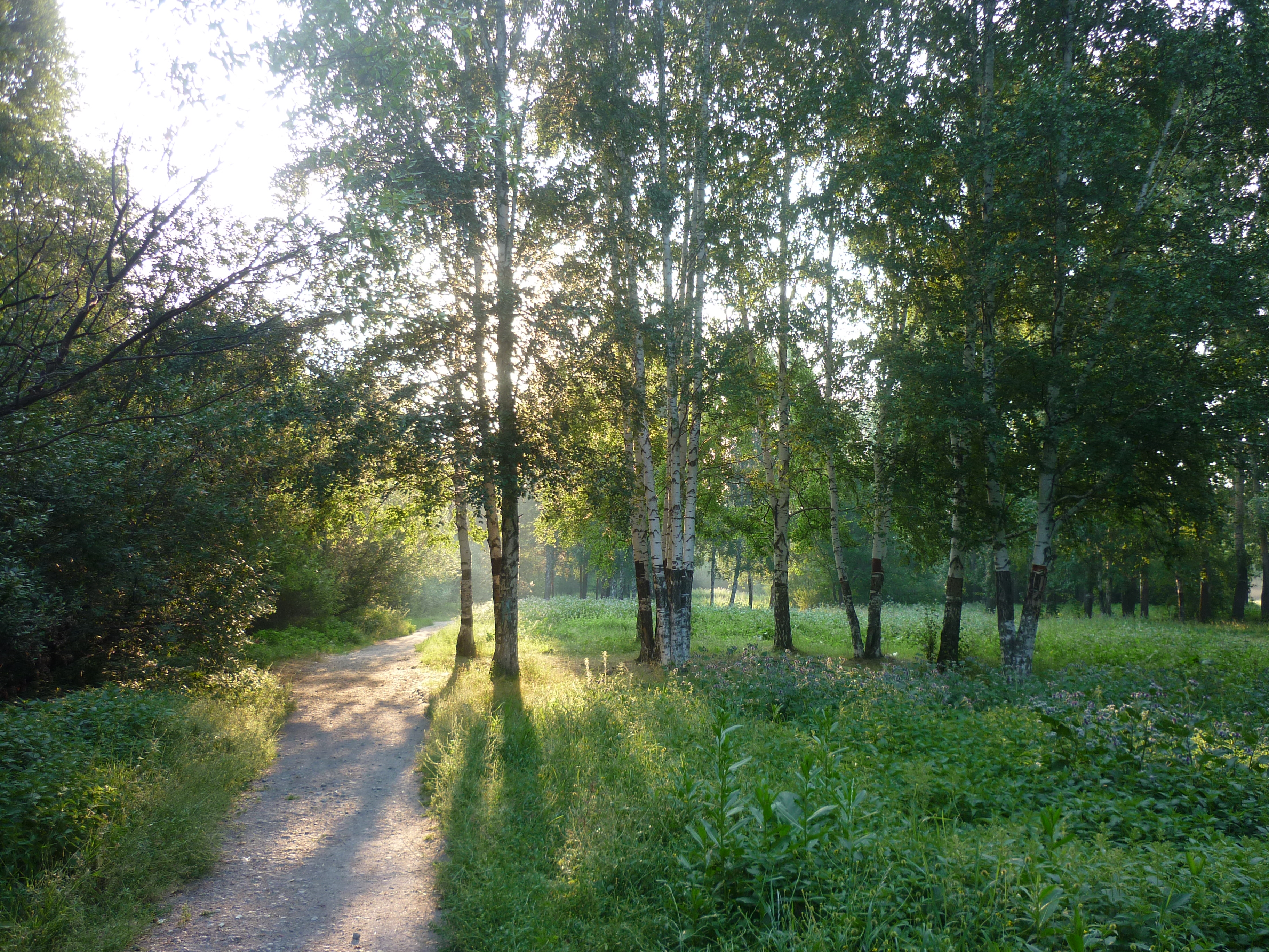 Собачий парк, Екатеринбург